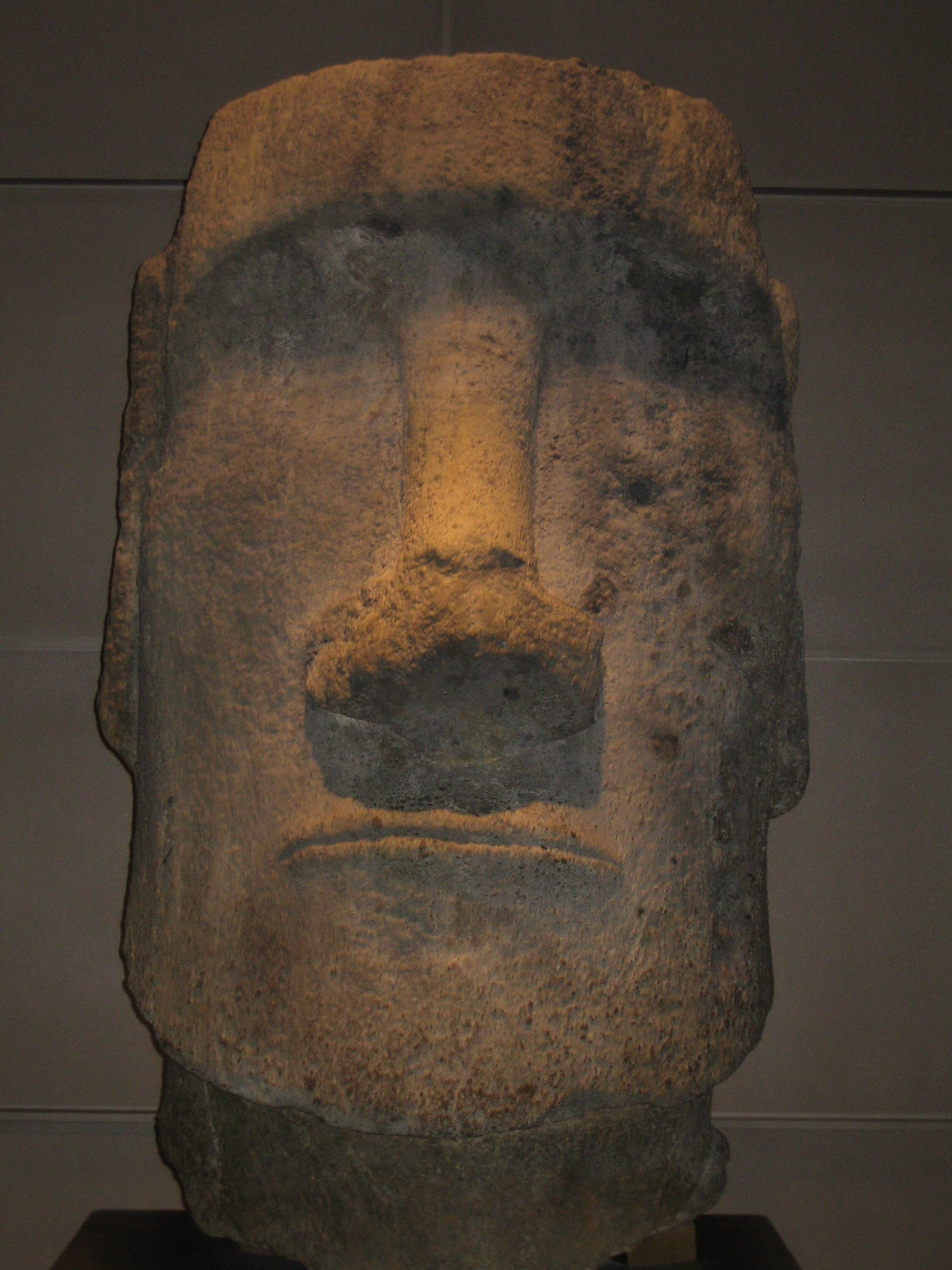 Picture of a Relocated Moai in Louvre in Paris